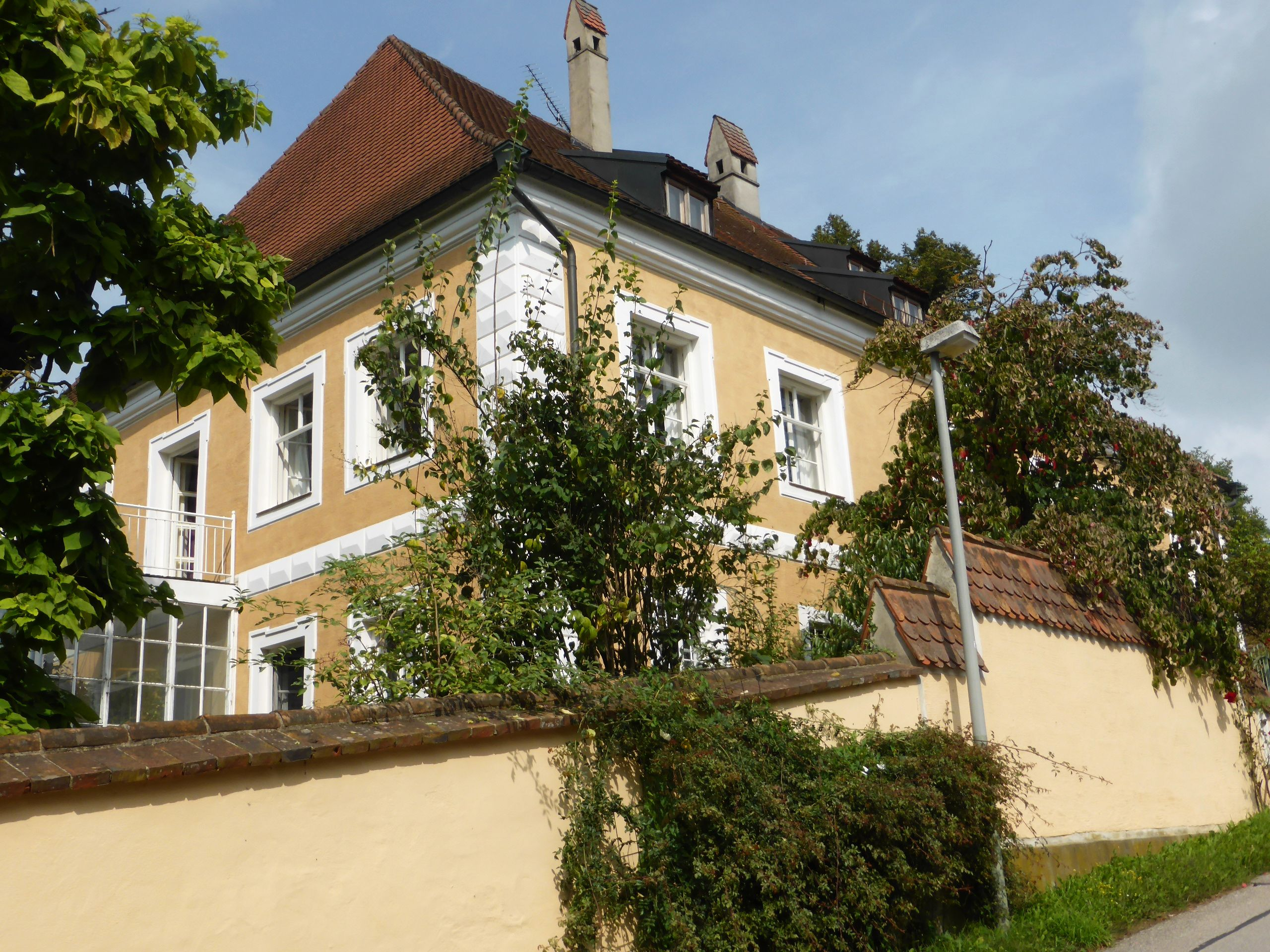 Schloss Loderham